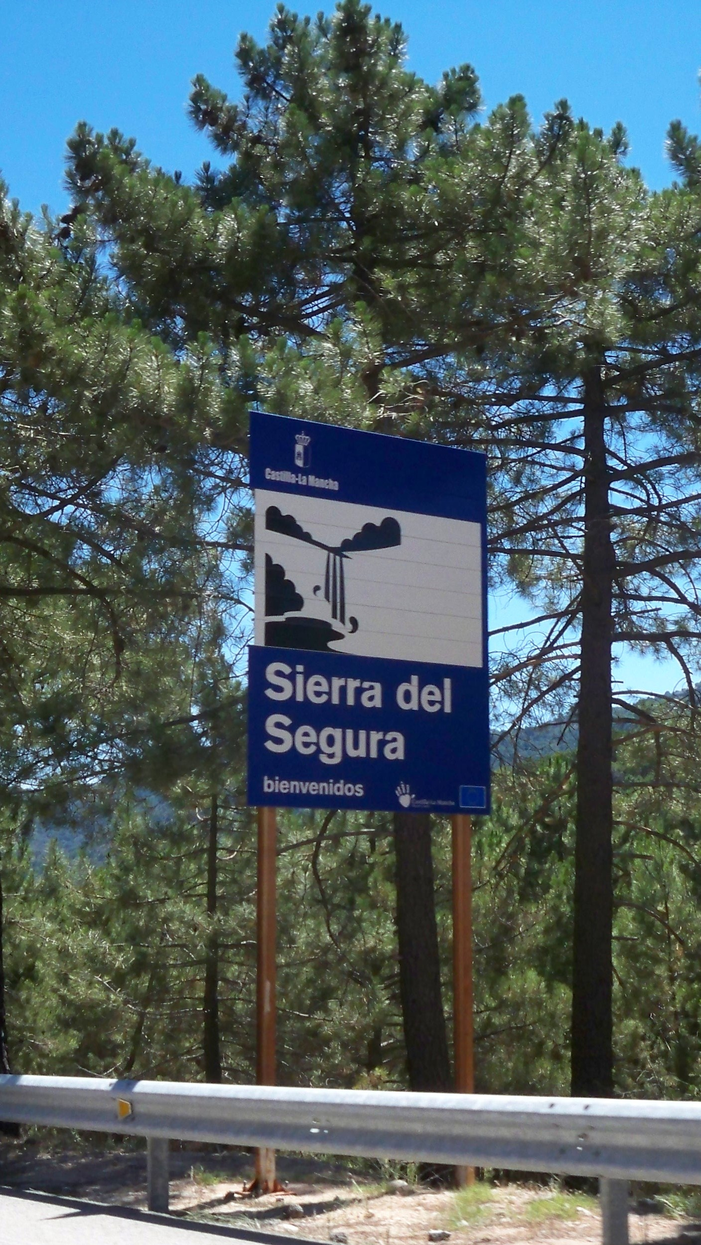 Cartel de bienvenida a la Comarca de la Sierra del Segura (Albacete-España), situado cerca del paraje del Nacimiento del Río Mundo